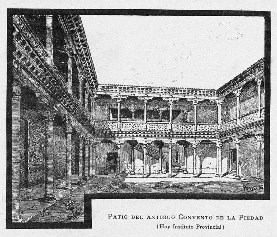 Patio del antiguo convento de la Piedad (más tarde Instituto Provincial), en Guadalajara.